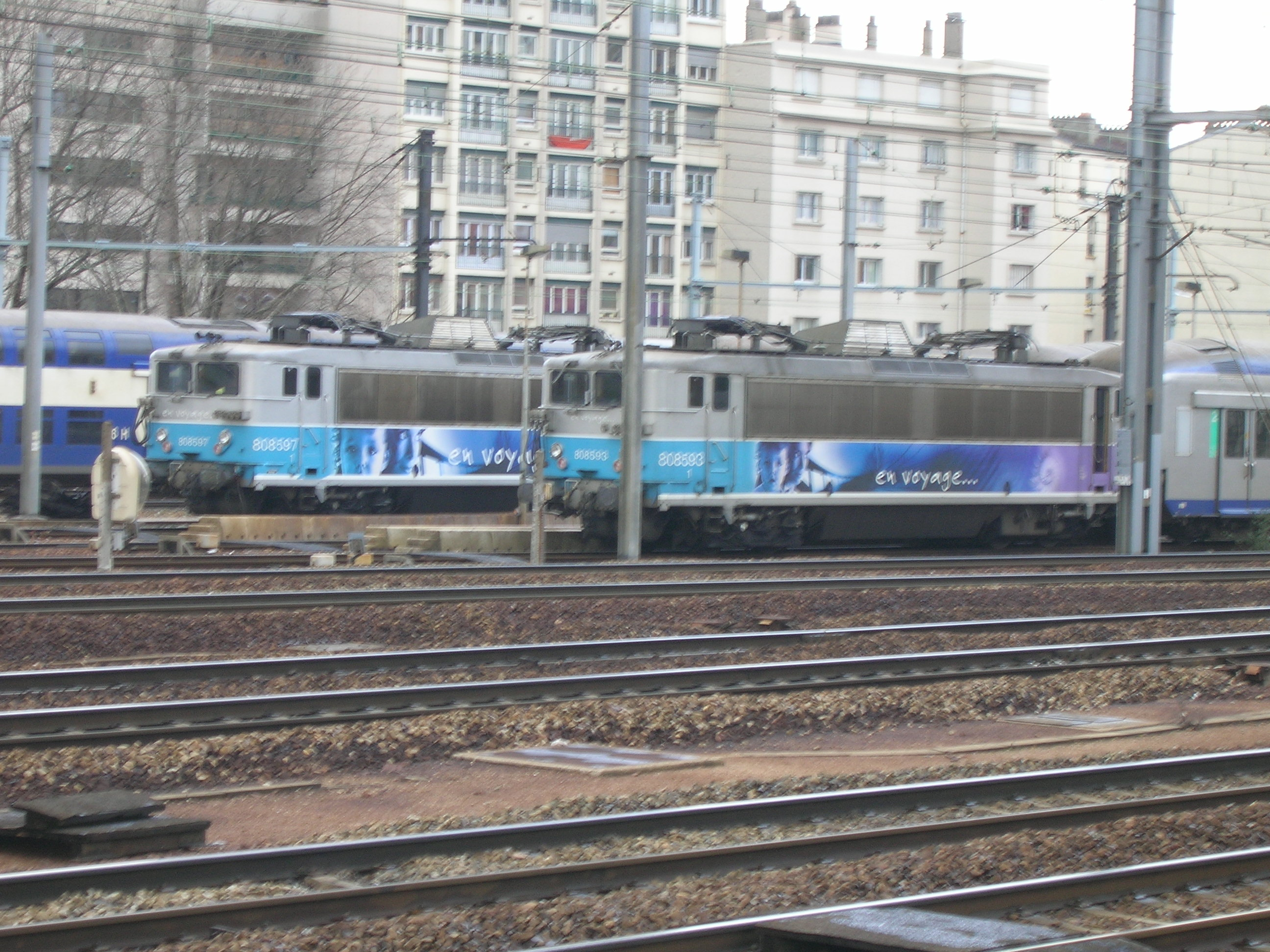 Author : Vincent BABILOTTE 24/03/2006 Gare Montparnasse, Ouest-Ceinture